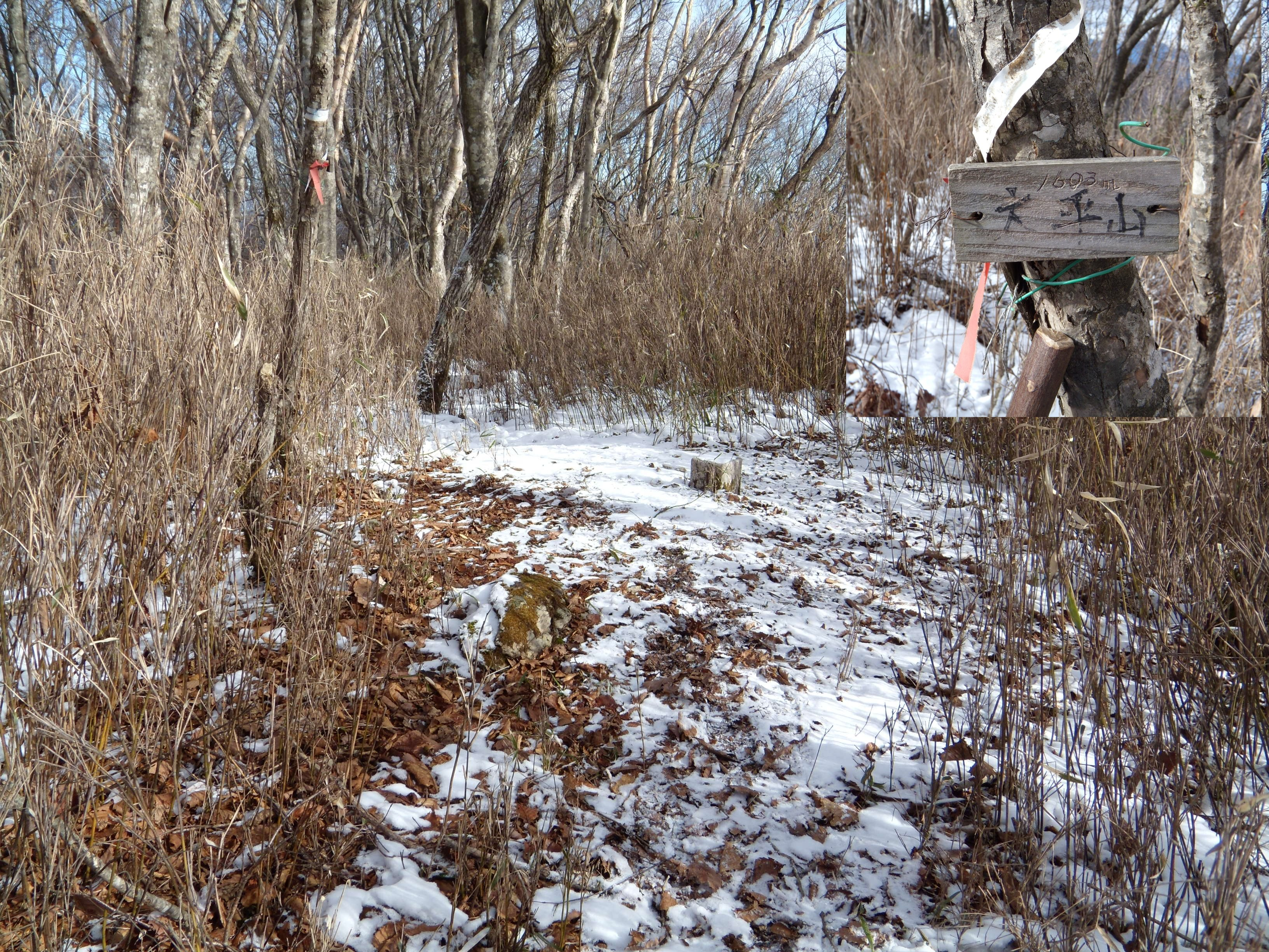 大平山の頂上